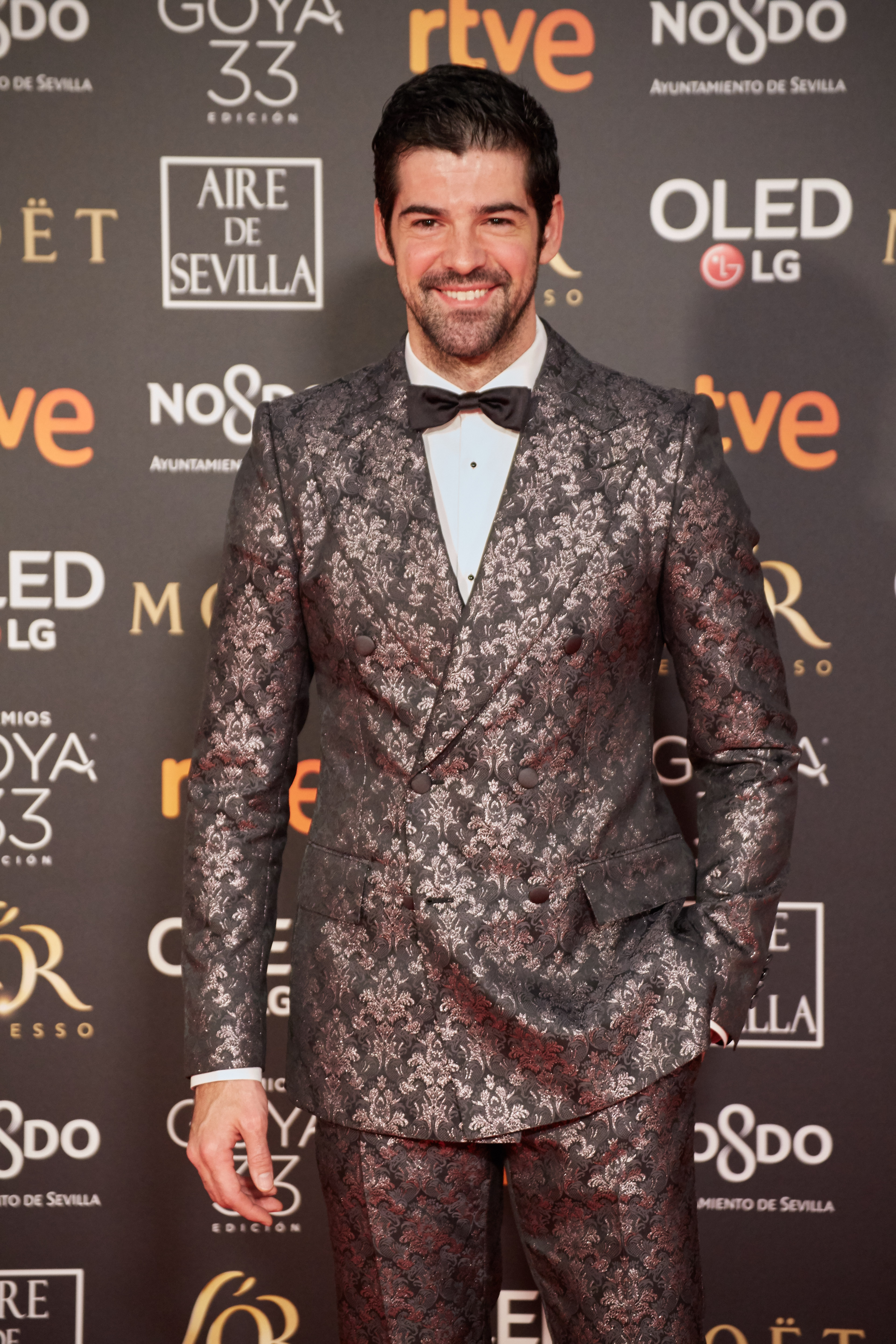 Miguel Angel Muñoz en la alfombra roja de los Premios Goya celebrados en Sevilla en Febrero 2019